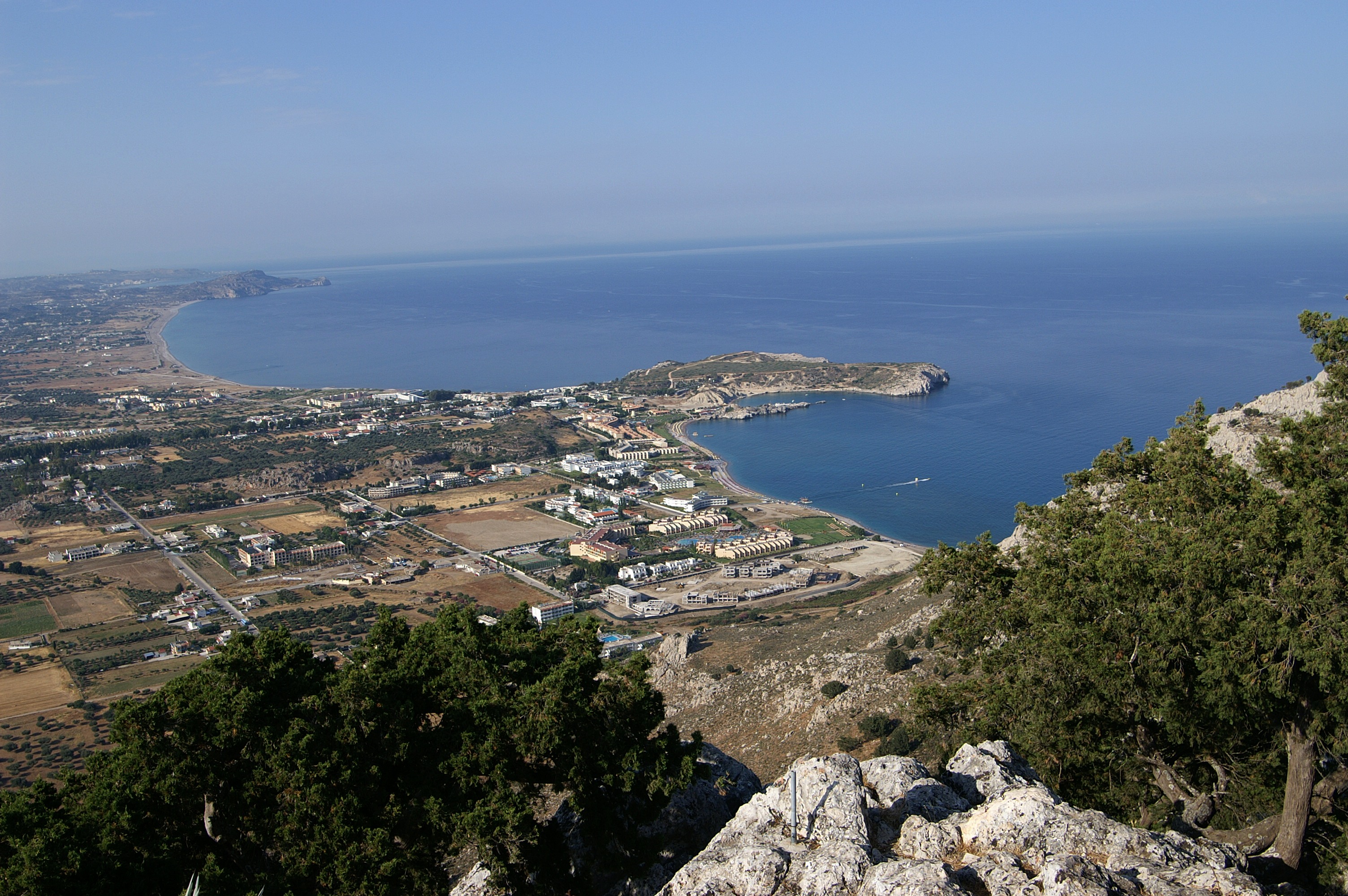 Blick von der Holy Monastery Santa Maria Tsampika "KYRA" auf 1000 Meter Höhe hinunter auf die Strände von Kolymbia und Afandou in Rhodos.